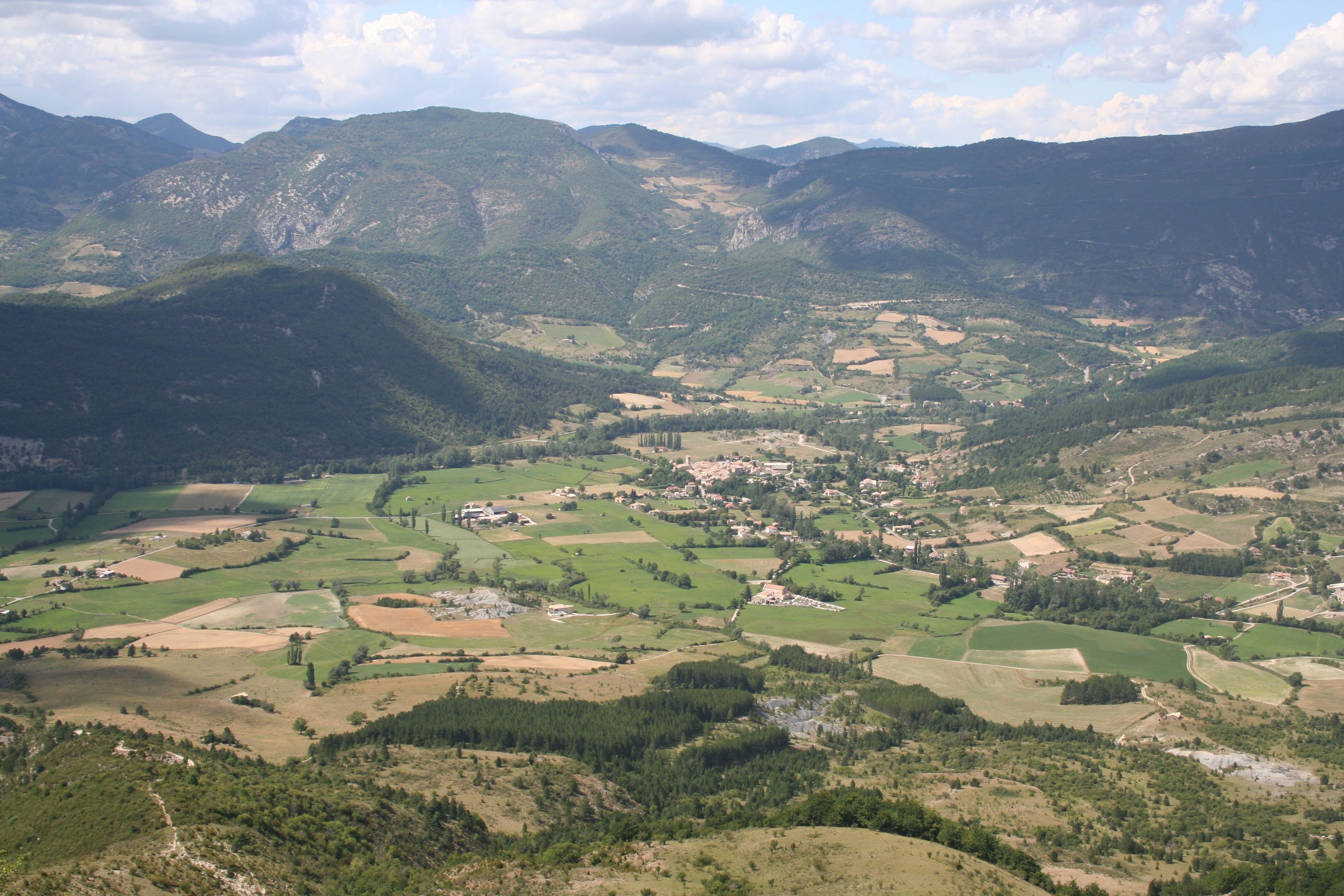 Panorama sur Lachau